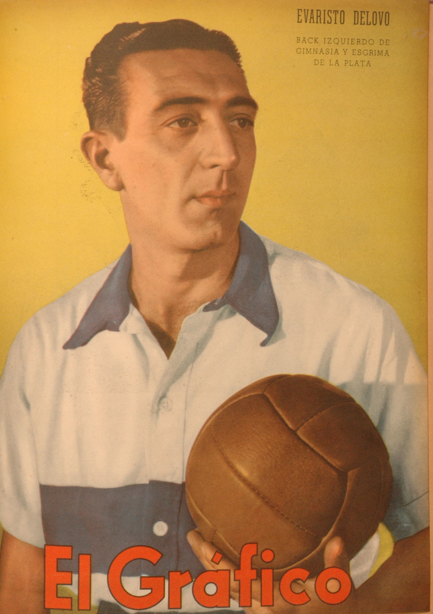 El Grafico del 30 de Agosto de 1940. Edicion 1103